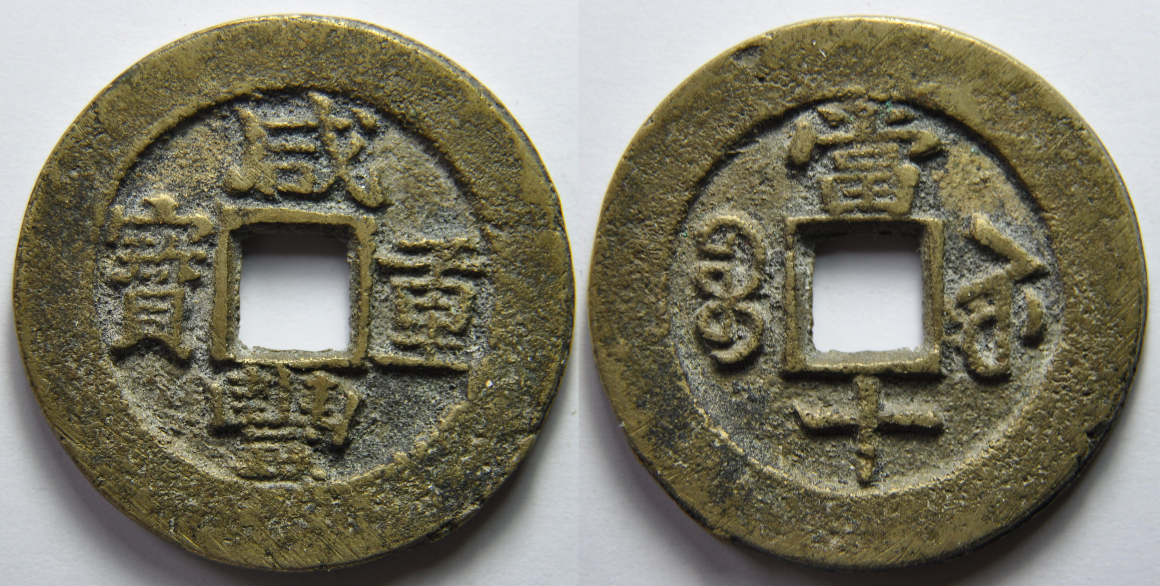 Une monnaie de 10 cash de l'empereur Wen Zong (1851-61), dynastie Qing (1644-1912) du Jiangsu. A/ Xian Feng zhong bao (Monnaie lourde de Xian Feng) R/ Bao su, Dang shi (valeur 10) Poids 13.7 g. Diamètre 34 mm Laiton Référence H22.888 Taille moyenne 1854-1855.